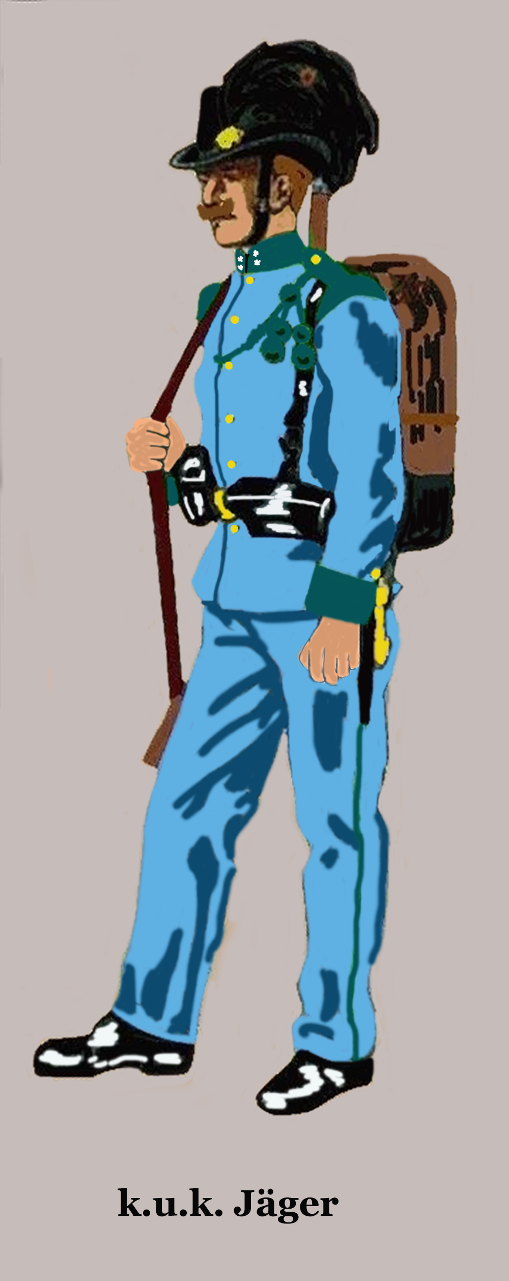 Jäger en Parade